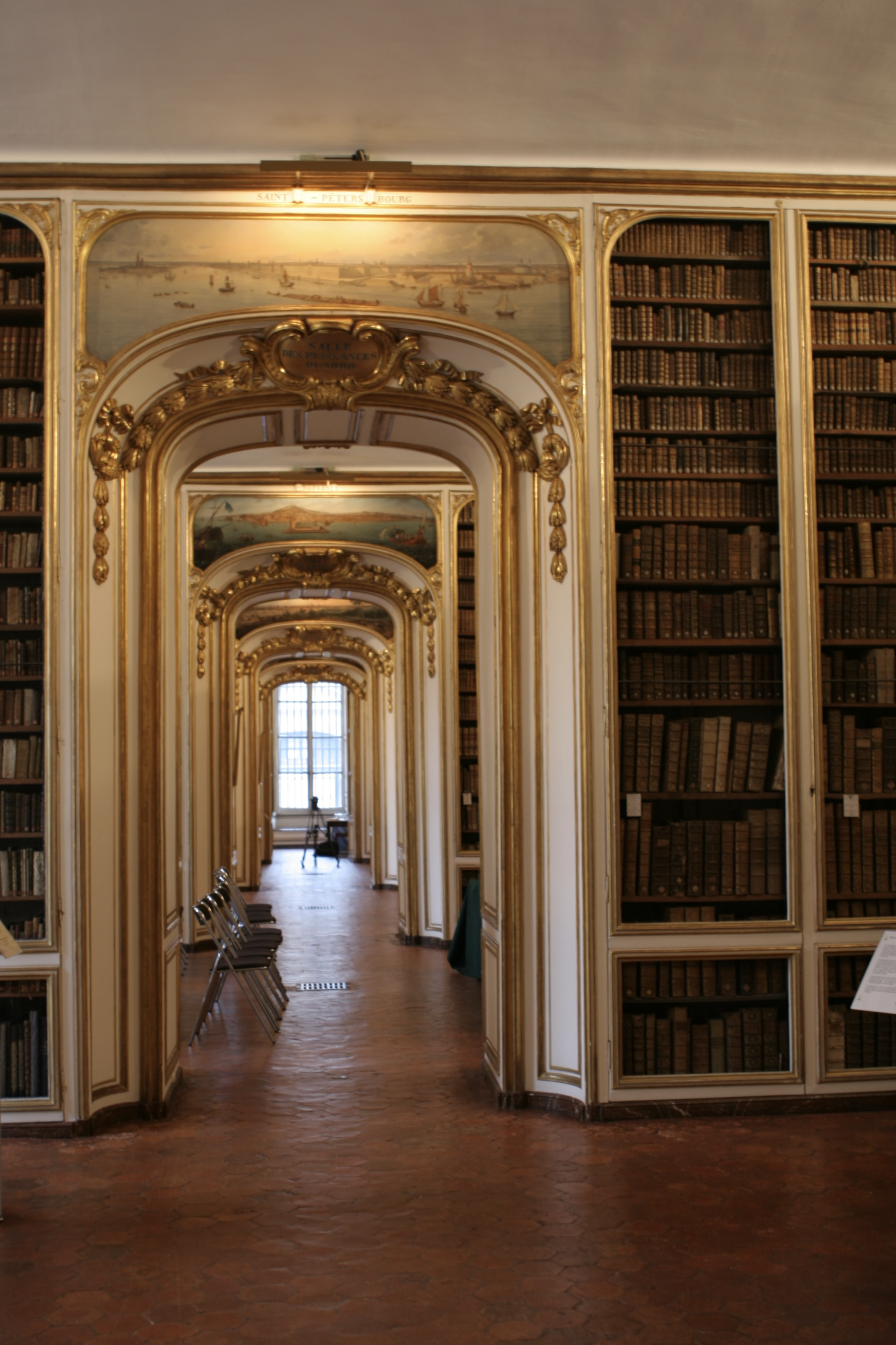 Galerie d'apparat de l'Hôtel des Affaires étrangères et de la Marine à Versailles.